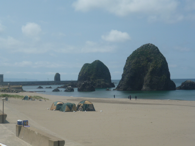 三本杉岩海水浴場にて撮影。